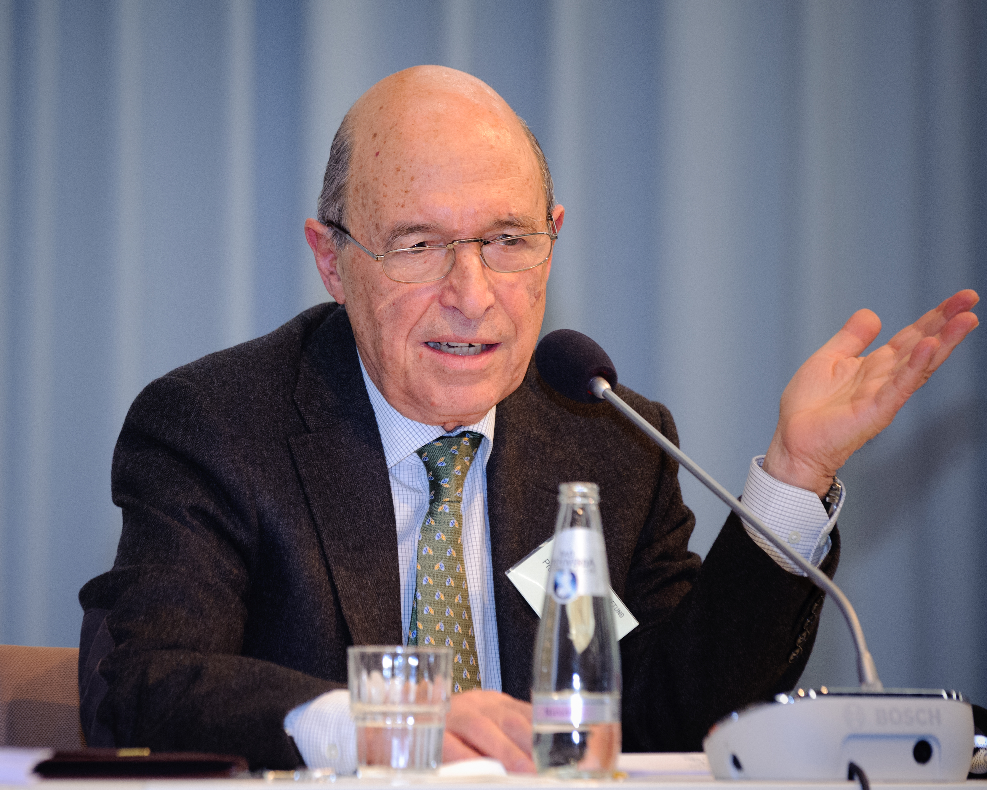 Prof. Dr. Konstantinos Simitis (Ex-Ministerpräsident Griechenlands) Konferenz: Hellas in der Krise Foto: Stephan Röhl